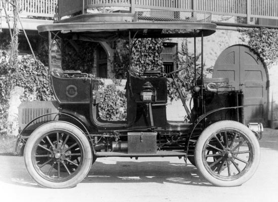 1903 Gardner-Serpollet, courtesy Larz Anderson Auto Museum